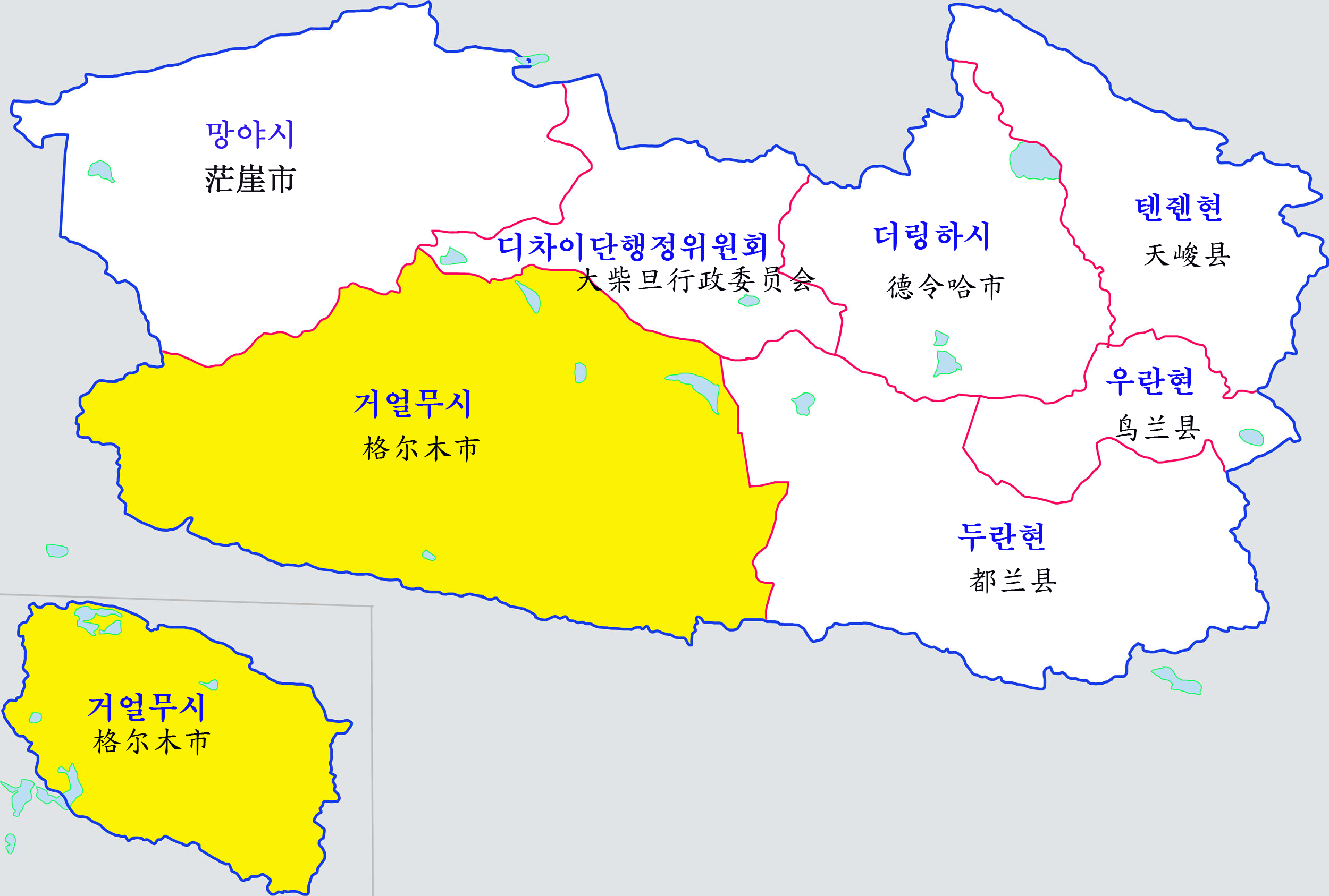 하이시몽골족자치주 행정구역도